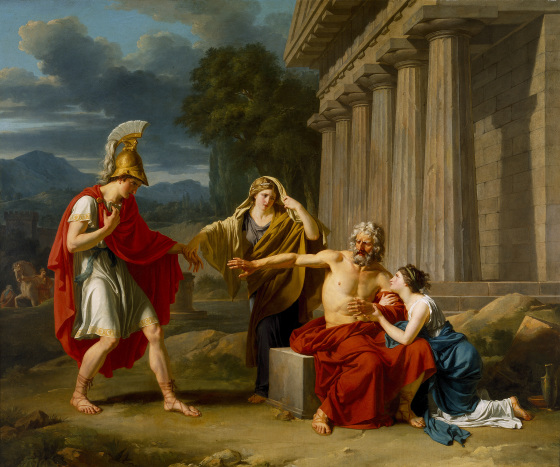 Œdipe à Colone (1788) Dallas Museum of Art, huile sur toile 164 x 194 cm